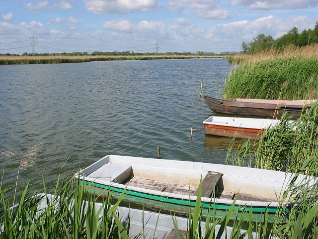 Schiaßer See (Nieplitz) bei Schiaß zwischen Blankensee und Jütchendorf, Brandenburg. Der Schiaßer See ist ein kleiner See, der von der Nieplitz durchflossen bzw. von der Nieplitz gebildet wird.